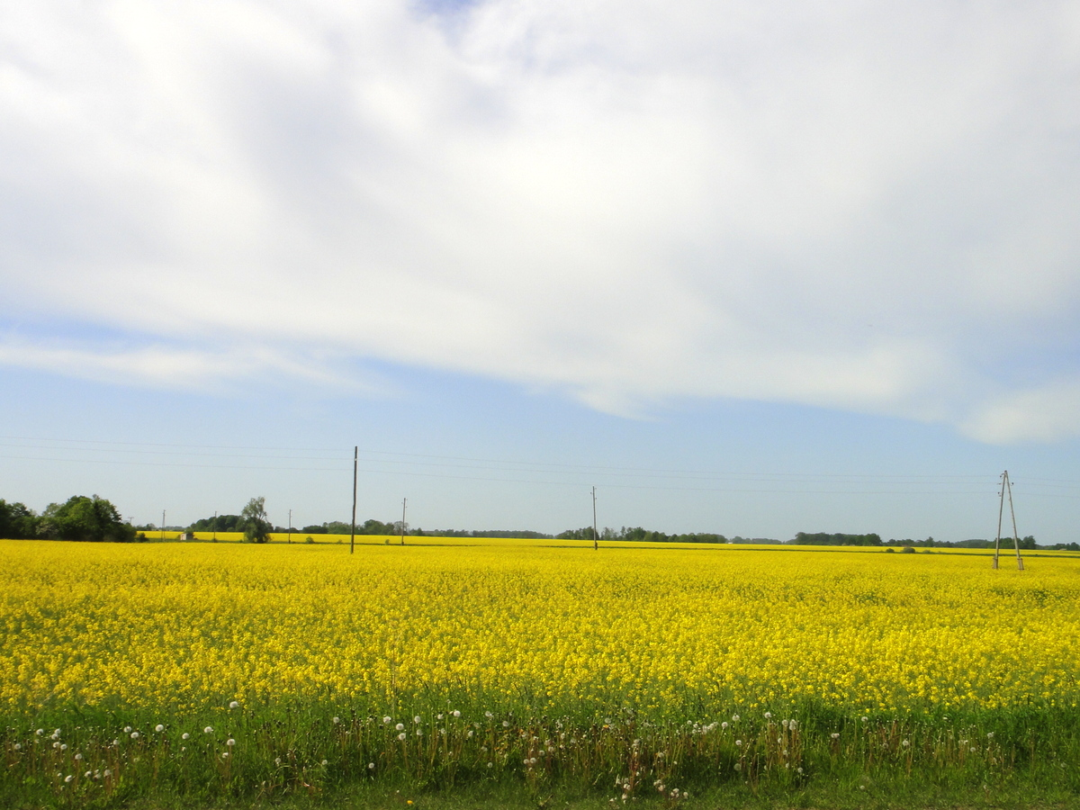 Augstkalne parish, Latvia